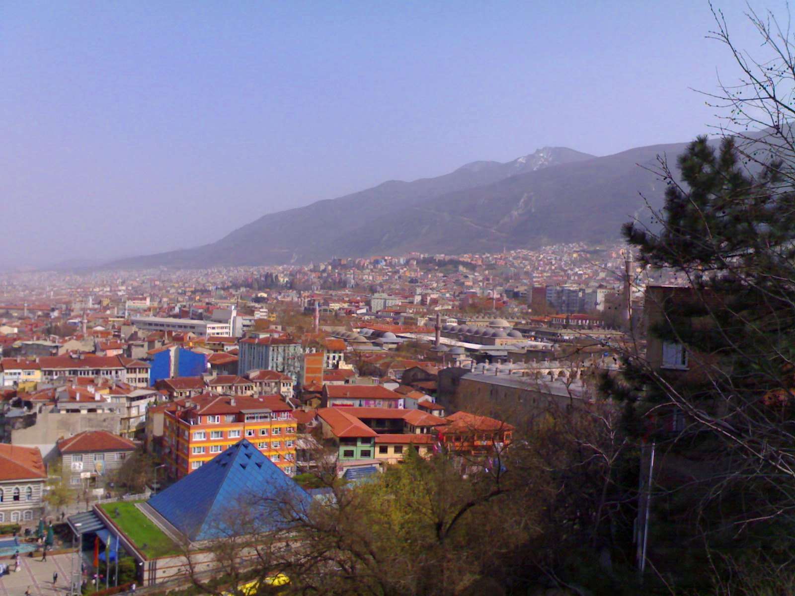 Tophane'den Bursa'nın genel görüntüsü